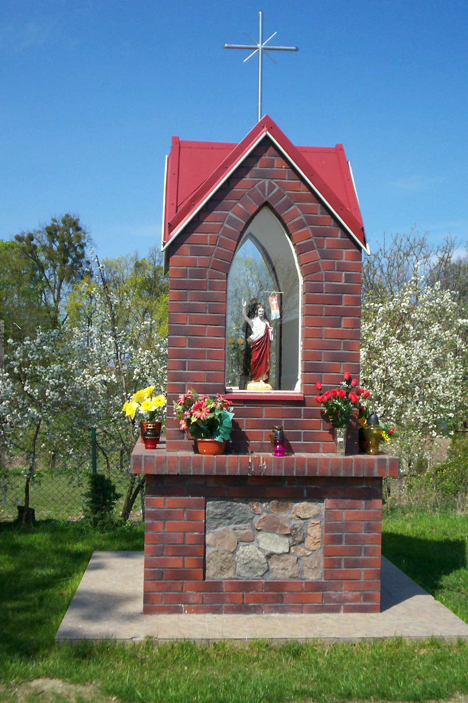 Przydrożna kapliczka w Bartążku